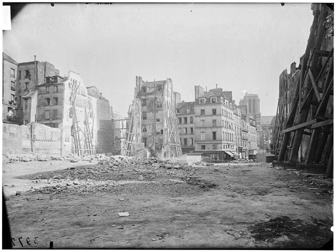 Vue des démolitions